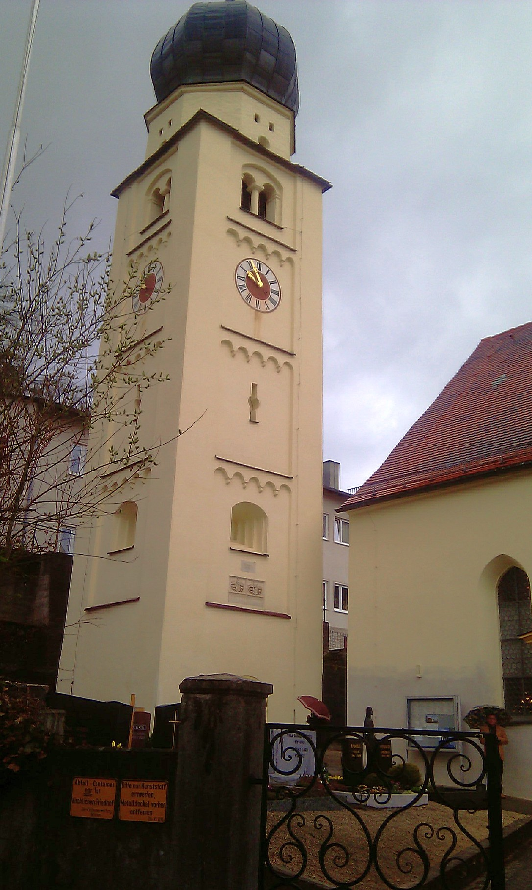 Freistehender Turm der Pfarrkirche Möhren bei Treuchtlingen